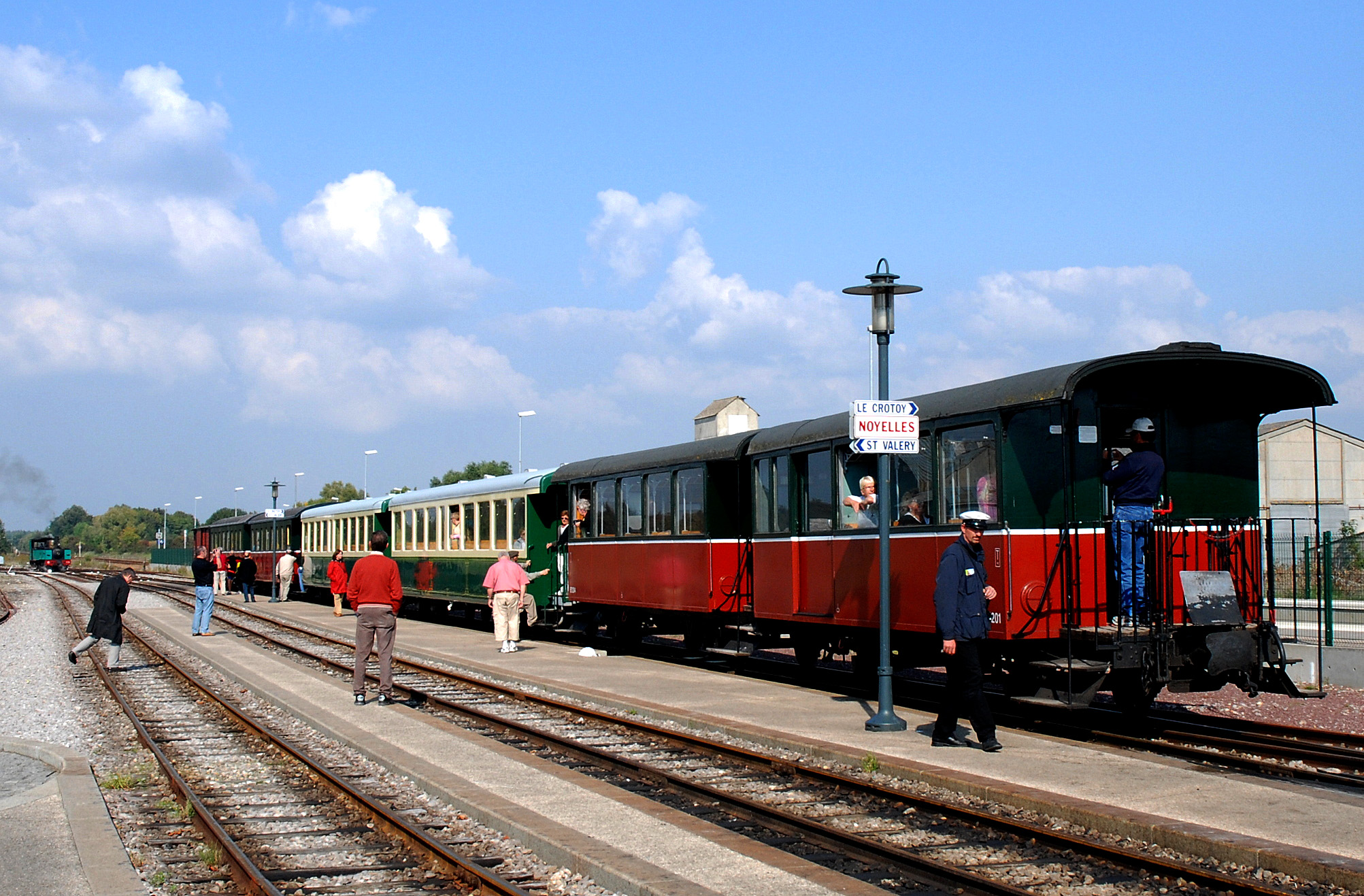 trein in het station van Noyelles-sur-Mer (Frankrijk) die Cayeux-sur-Mer met Le Crotoy verbindt